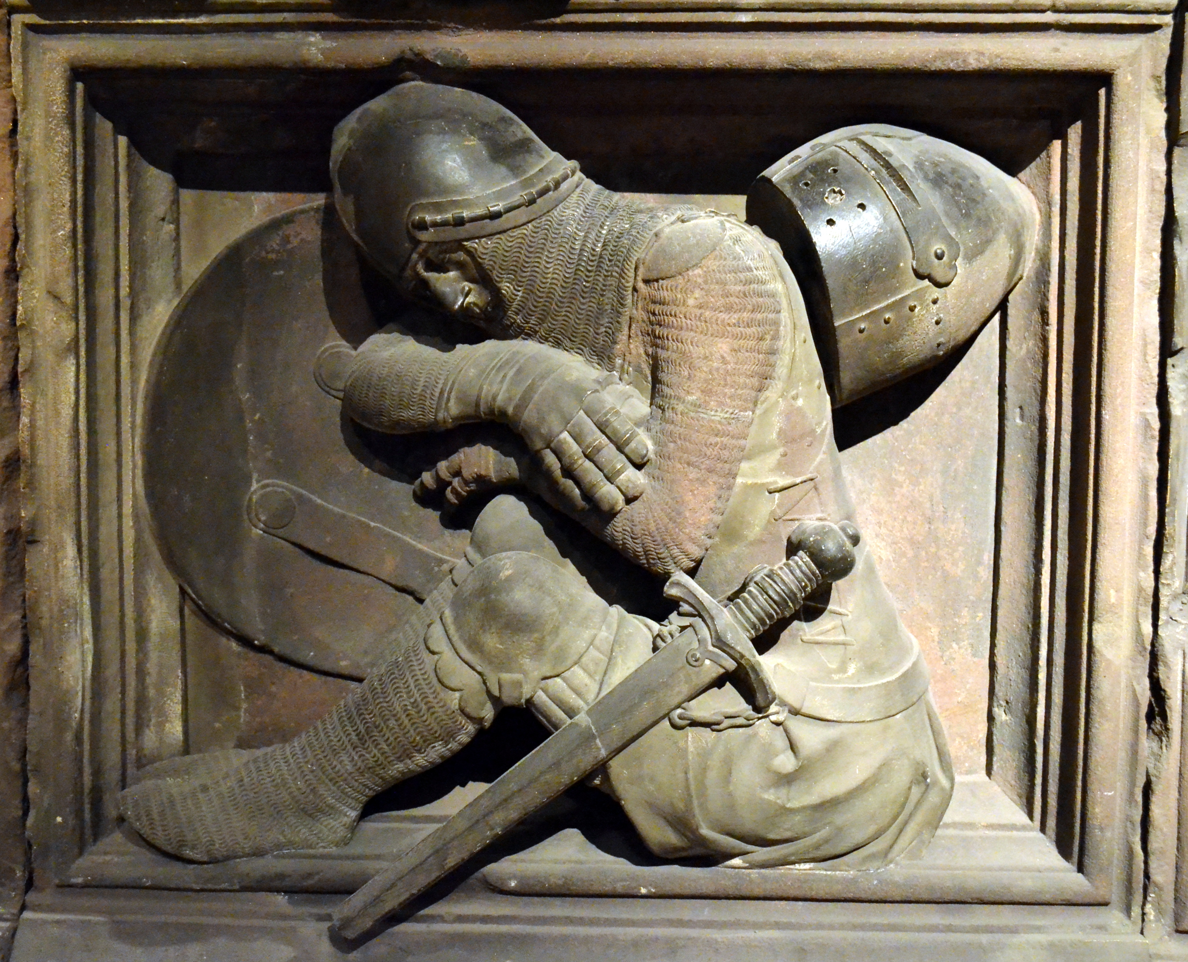 Straßburg, Frauenhausmuseum: Ritter in Rüstung und Waffen (Kettenhemd, Helm, Schild, Schwert)